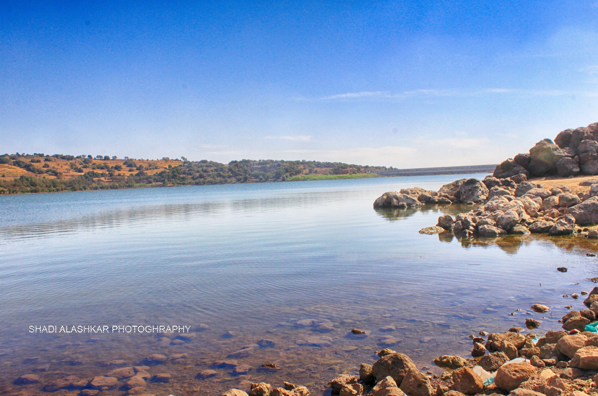 سد حبران